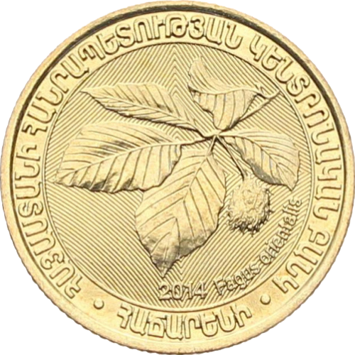 Памятная монета Армении 2014 года "Бук восточный" - 200 драмов - латунь